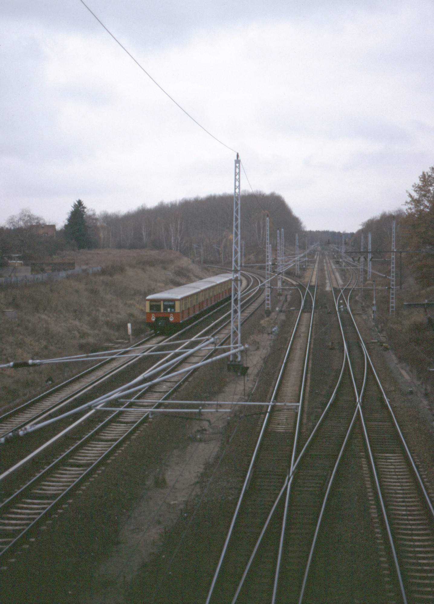 Abzweig Schönfließ West bei Berlin